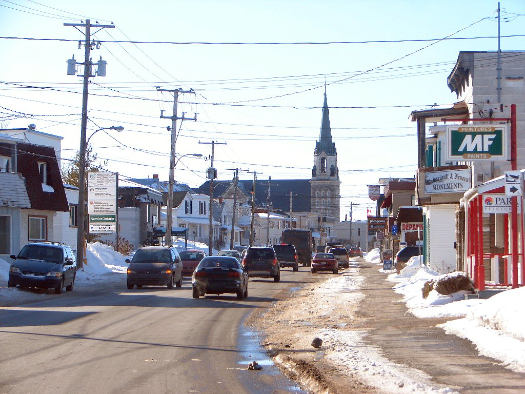 Hawkesbury, Ontario, Canada